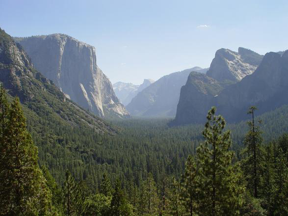 Yosemite valley, California, USA / Bildquelle: .